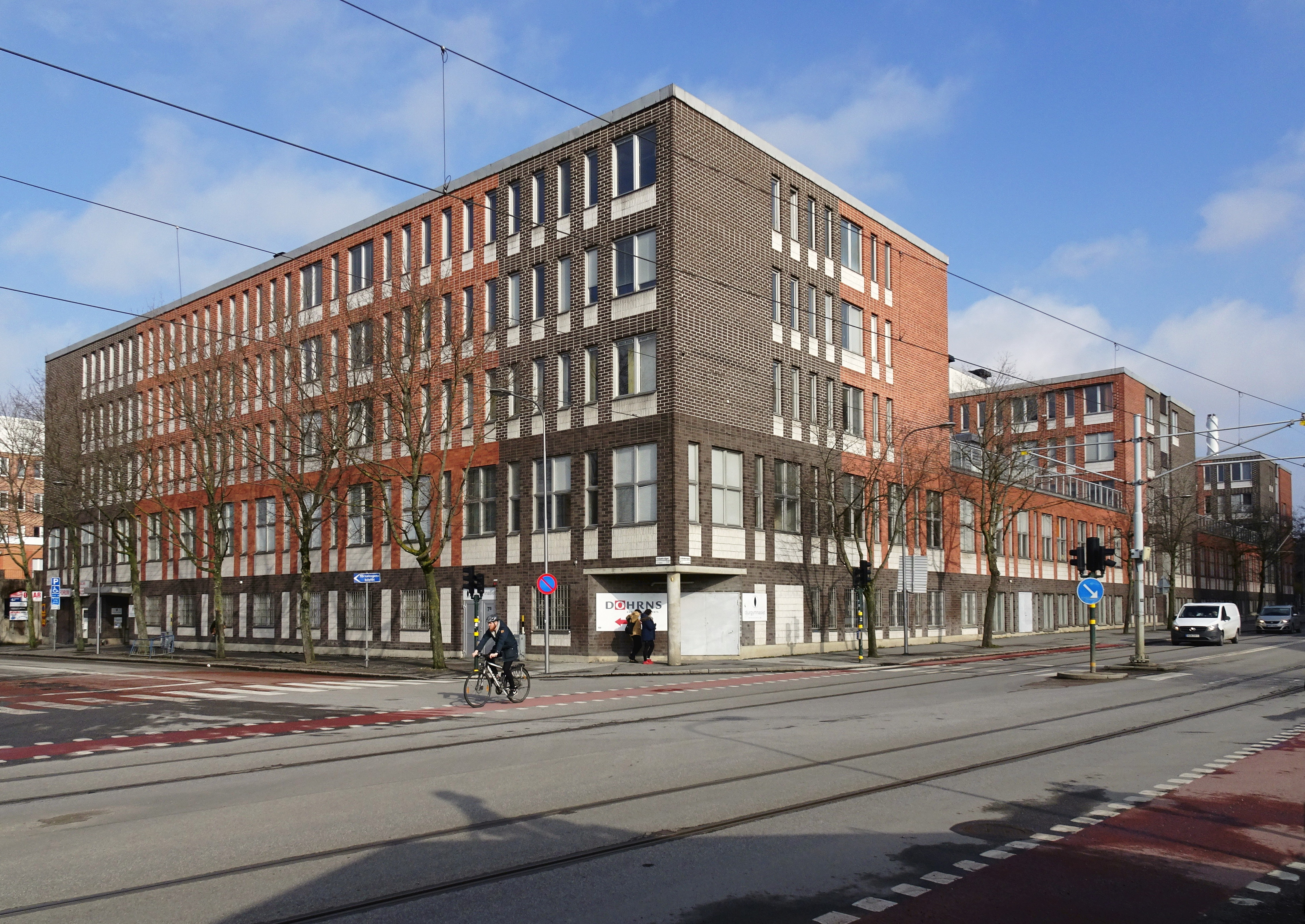 Tryckeriet 14, Liljeholmen, arkitekt Backström & Reinius